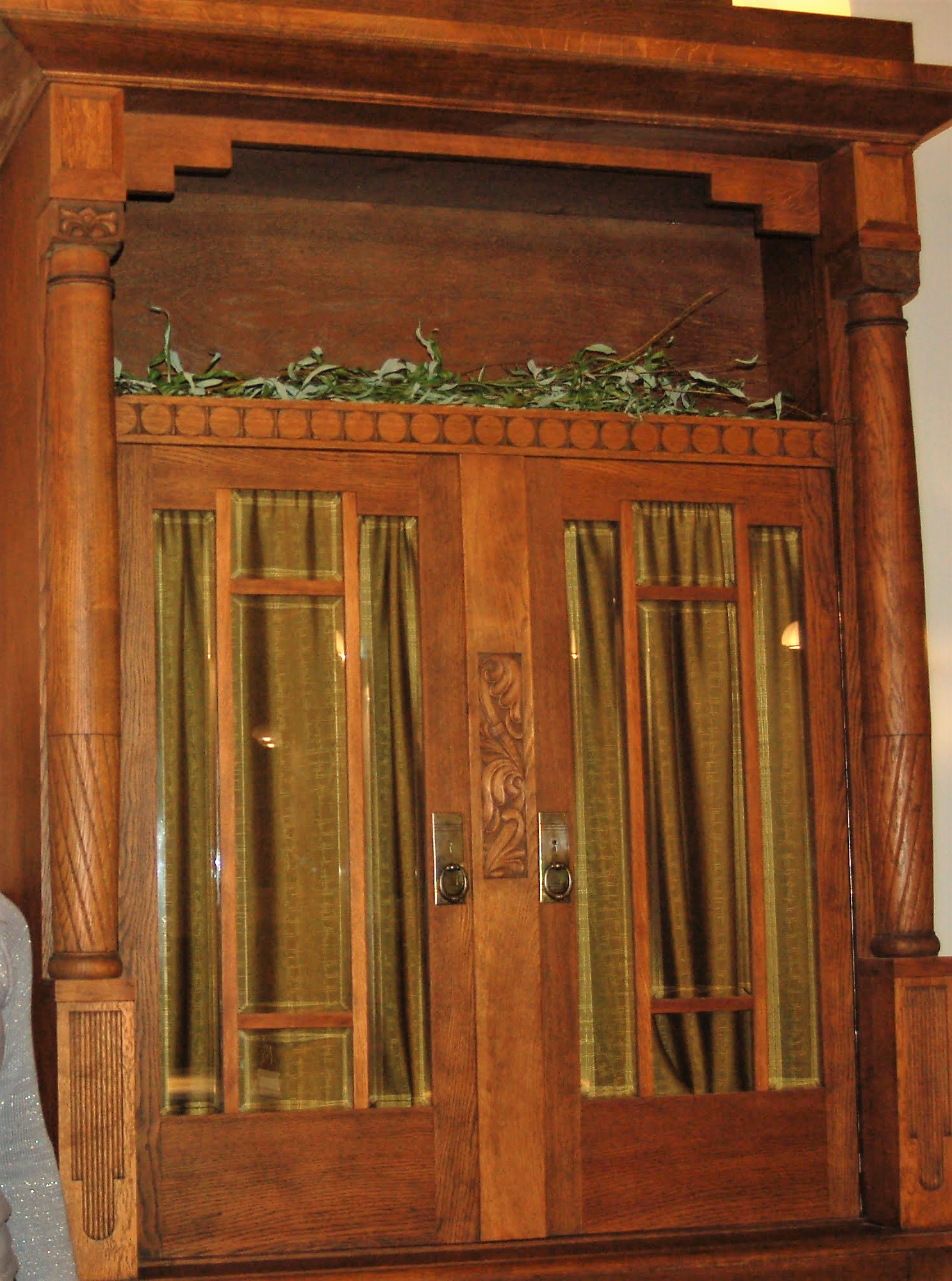 ארון הקודש ב'שטיבל' של קהילת יהודי מזרח אירופה בברסלאו, התמונה צולמה בנובמבר 2016 ע"י בעז פכלר, ונערכה והועלתה על ידי באישורו